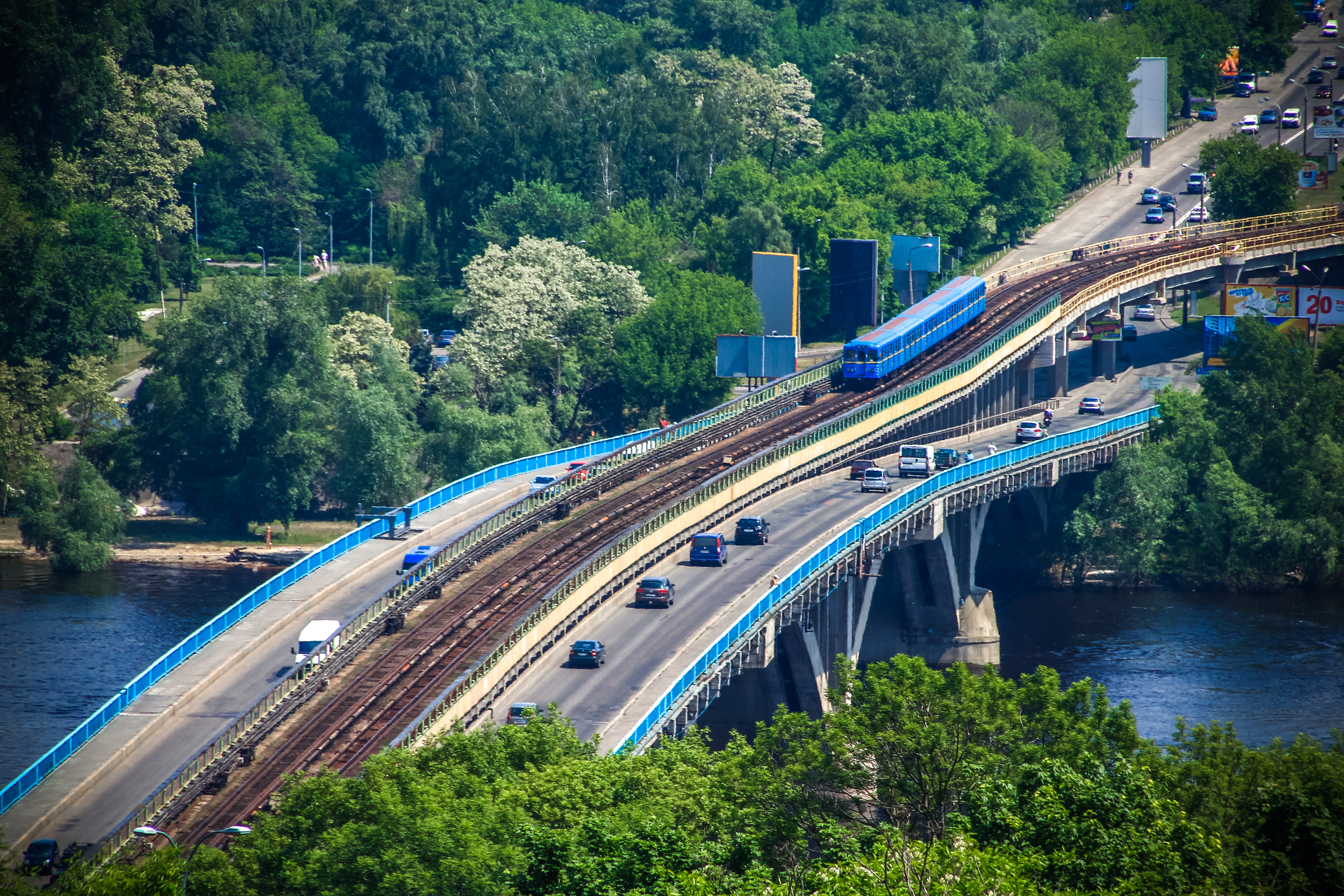 Мост Метро (Киев)